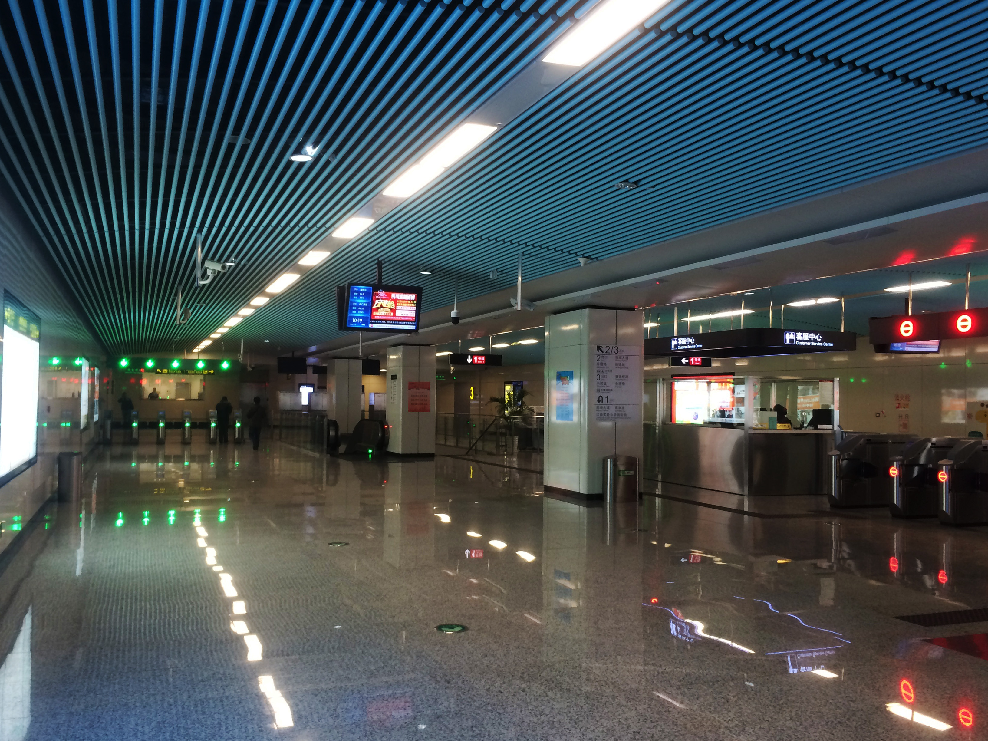 無錫地鐵1號線塘鐵橋站站廳